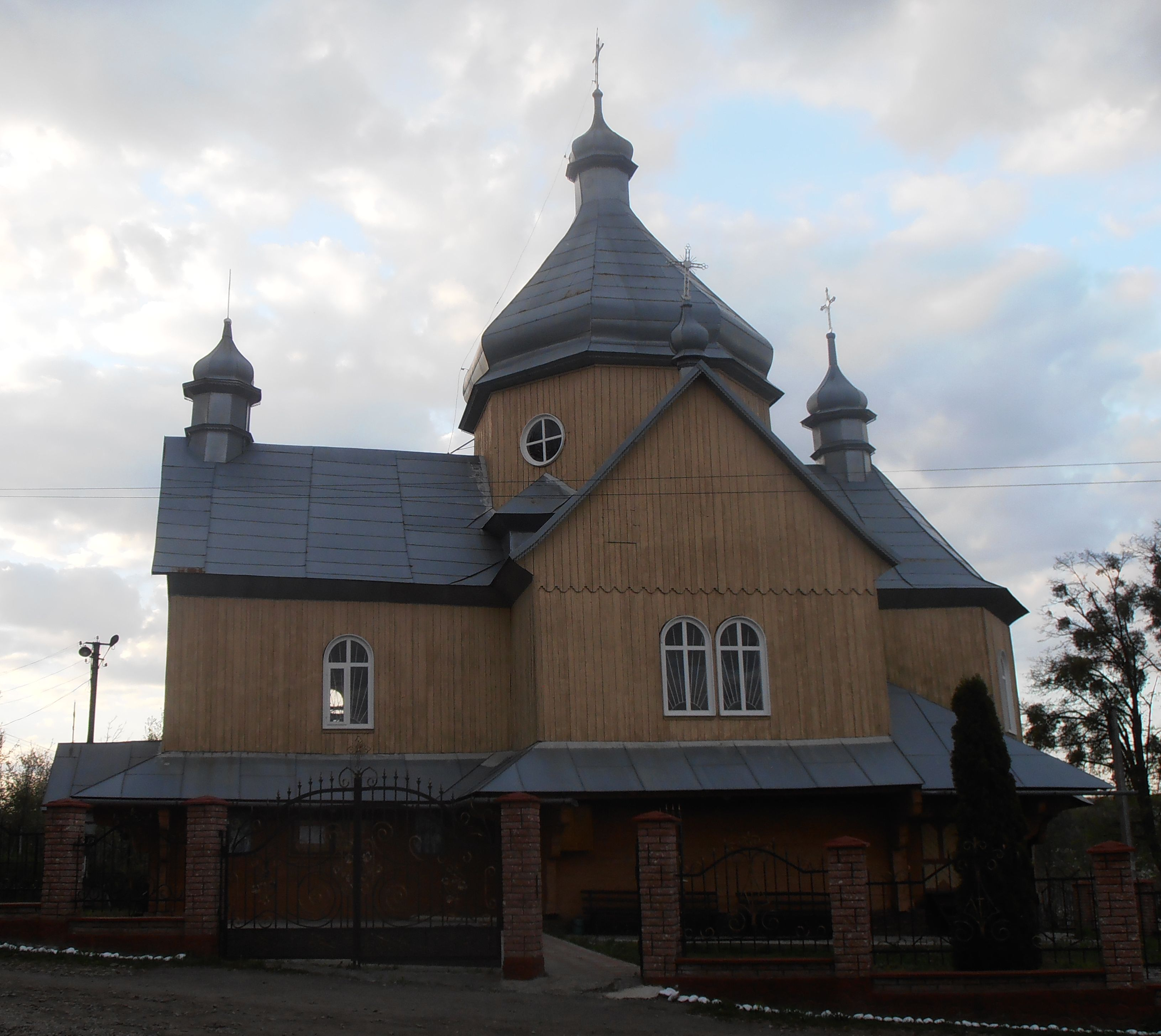 Церква Пресвятої Діви Марії (дер.), Кудлатівка